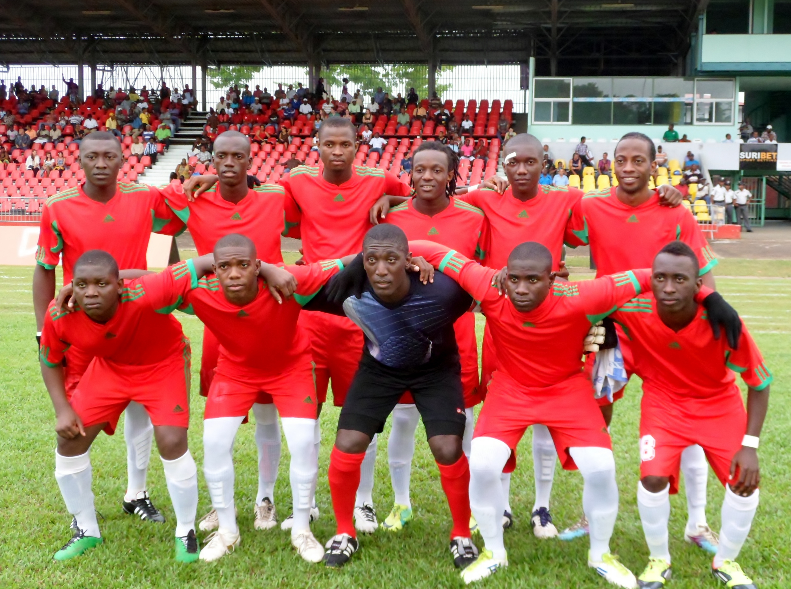 Der SV Robinhood am 25-03-2012 im Andre-Kamperveen-Stadion, Paramaribo, Suriname vor dem Hoofdklassespiel gegen den SV Transvaal. Der Spitzenreiter der höchsten Fußball-Spielklasse in Suriname, der SV Robinhood gewann die Begegnung mit 3:2 Toren. Unknown